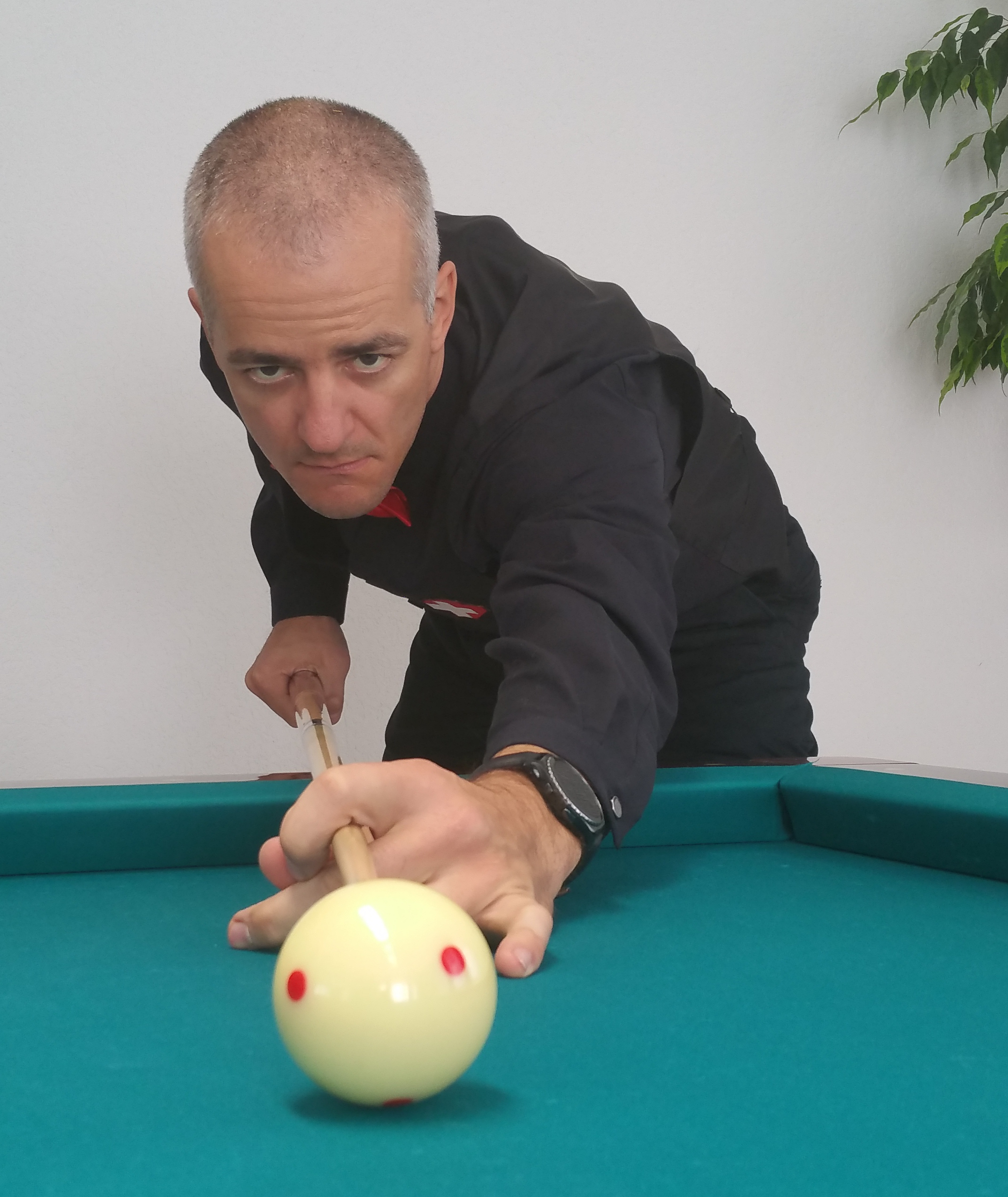 joueur de billard suisse